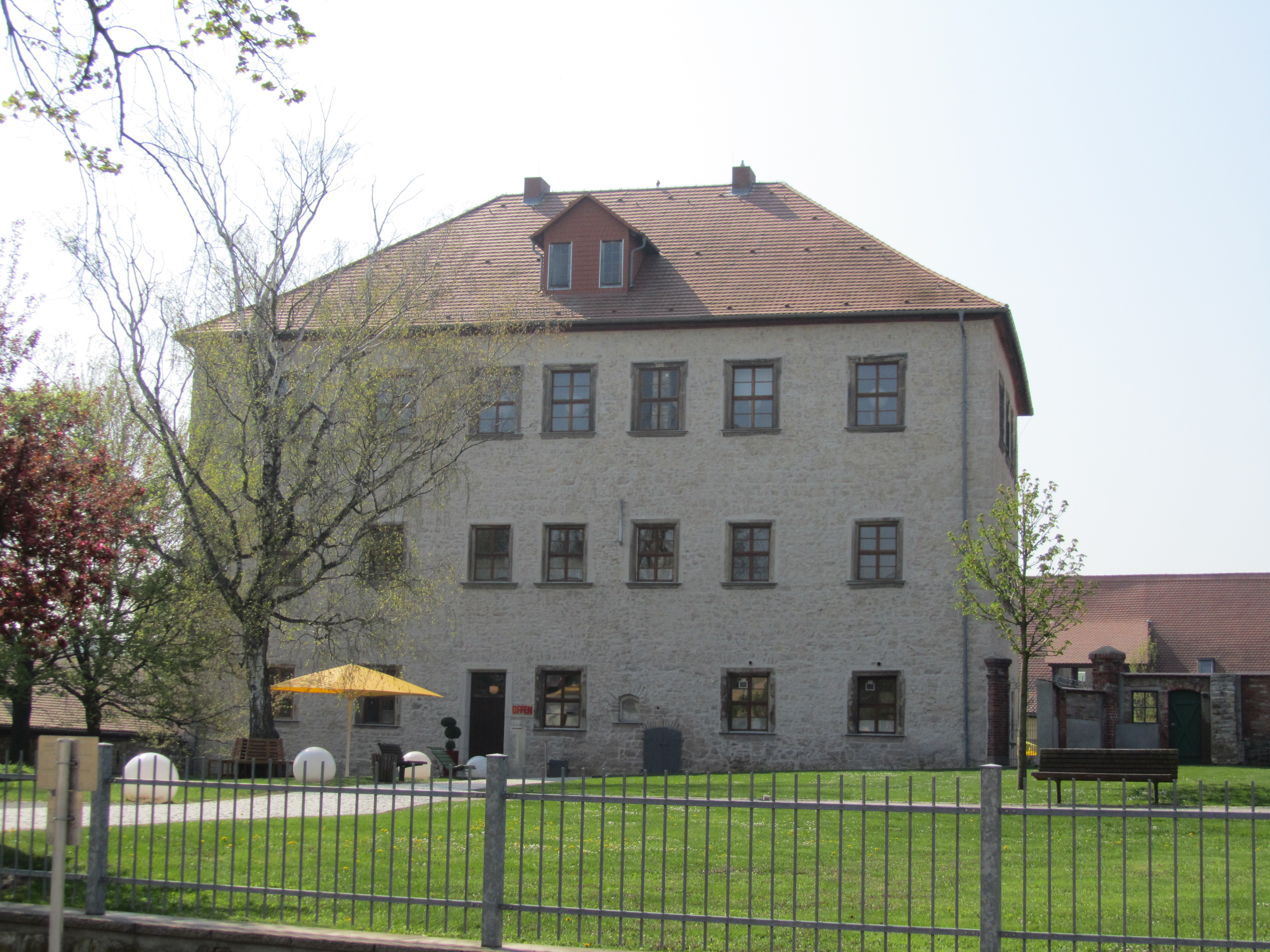 Das Schloss in Auerstedt (Thüringen).